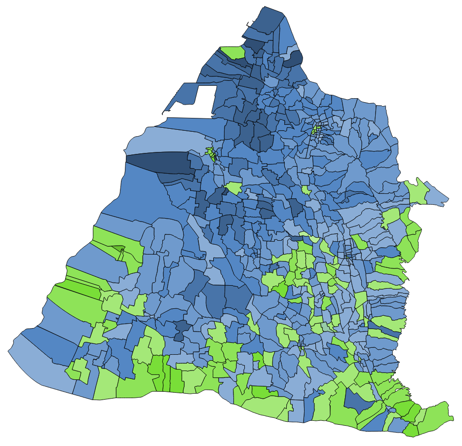 顏色對照表